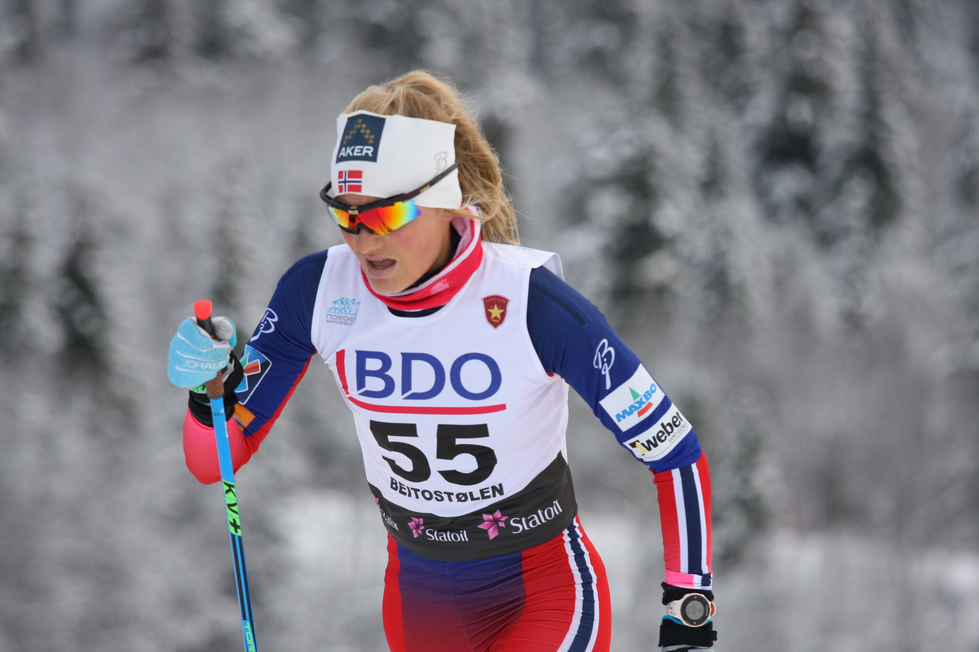 Martine Ek Hagen, 2014.